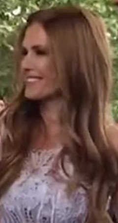 Urtubey y Macedo a los medios durante su casamient